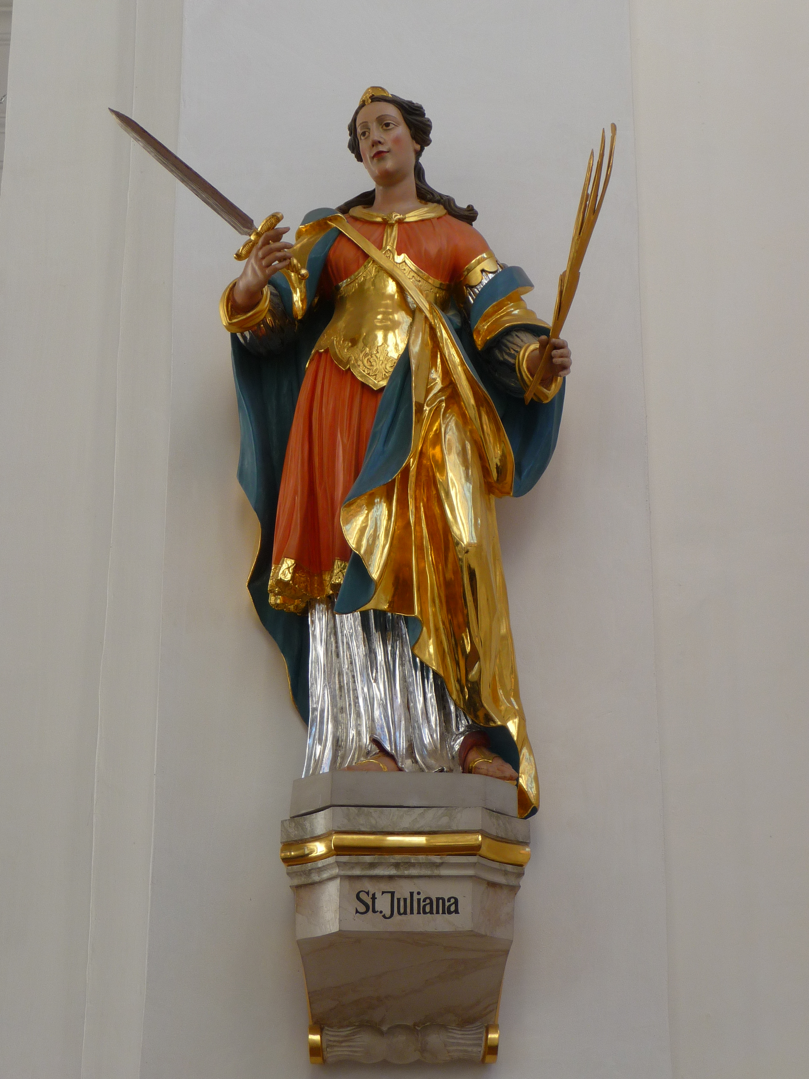 Darstellung der Heiligen Juliana (um 1770), fotografiert in der Jesuitenkirche in der Heidelberger Altstadt, ursprünglich Ausstattung der Heidelberger Karmelitenkirche (Baden-Württemberg, Deutschland)